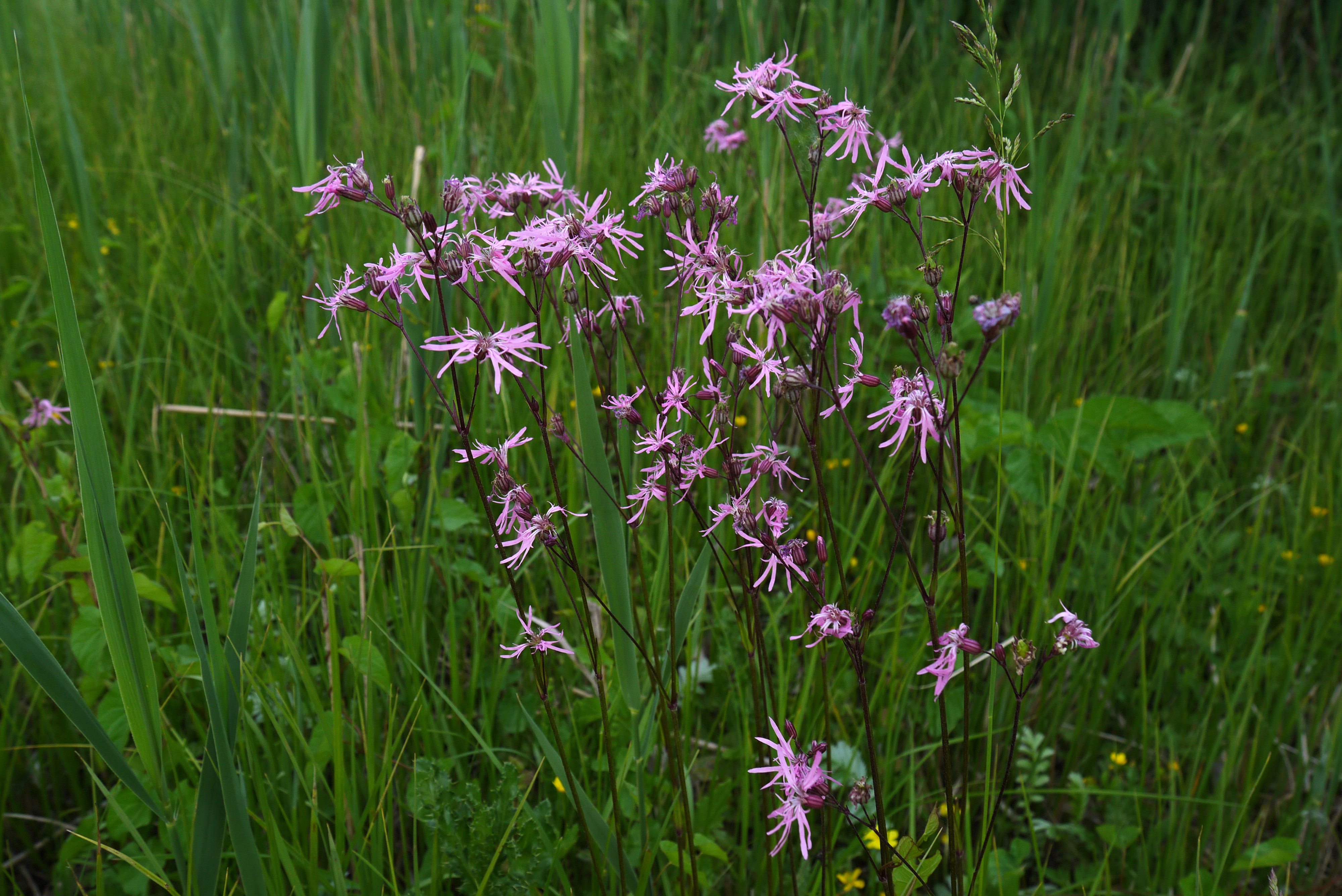 «Стрижавські орхідеї», Вінницький район, Стрижавська селищна рада